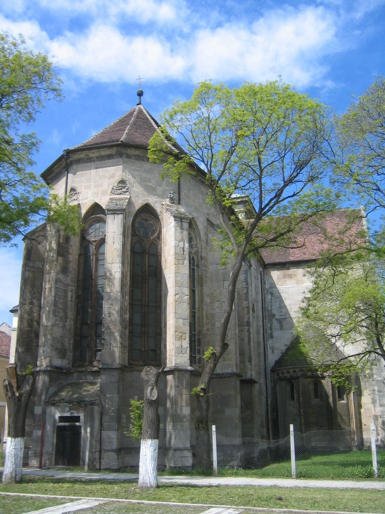 Catedrala romano-catolică din Alba Iulia (detaliu din spate)